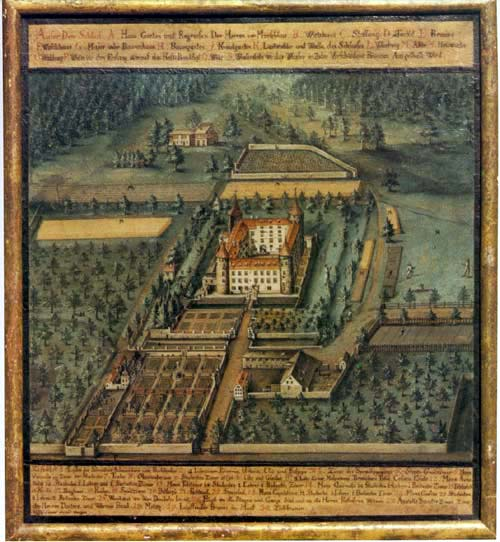 Schloss Marschlins Zustand des Schlosses um 1775